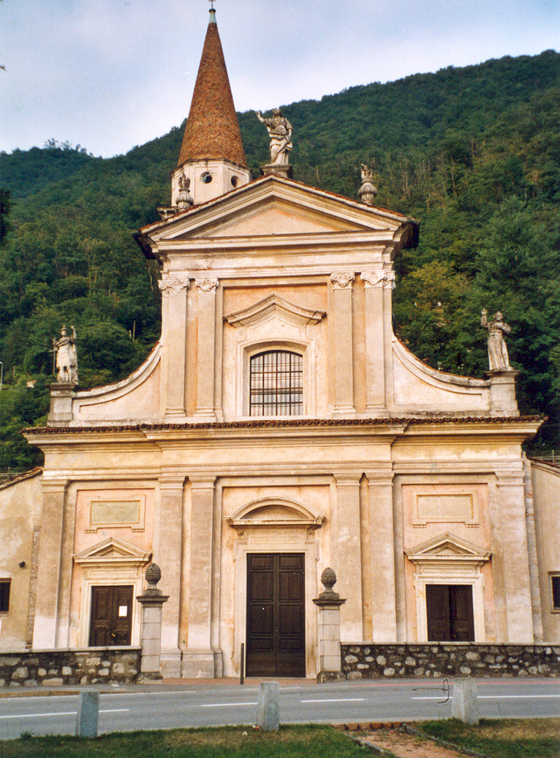 Bissone, Kirche San Carpoforo am Luganersee, Kanton Tessin, Schweiz.